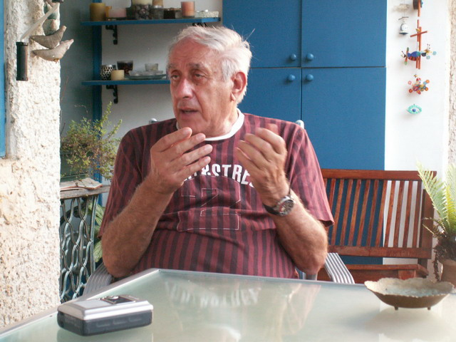 רלף קליין, ראיון ב-2006 לאתר "צהבת" צולם על-ידי אבי קדמי to be photographed by Avi Kedmi